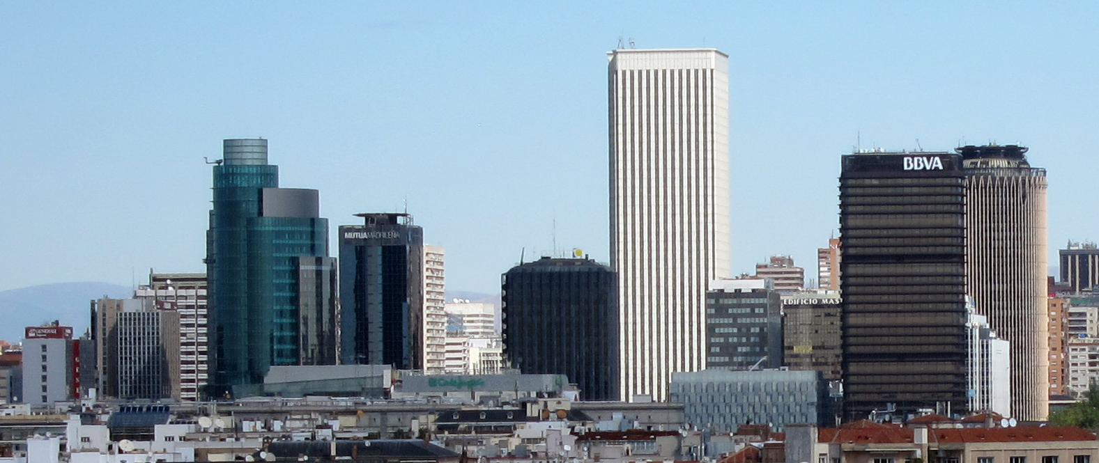 Panorama urbano del paseo de la Castellana (Madrid)